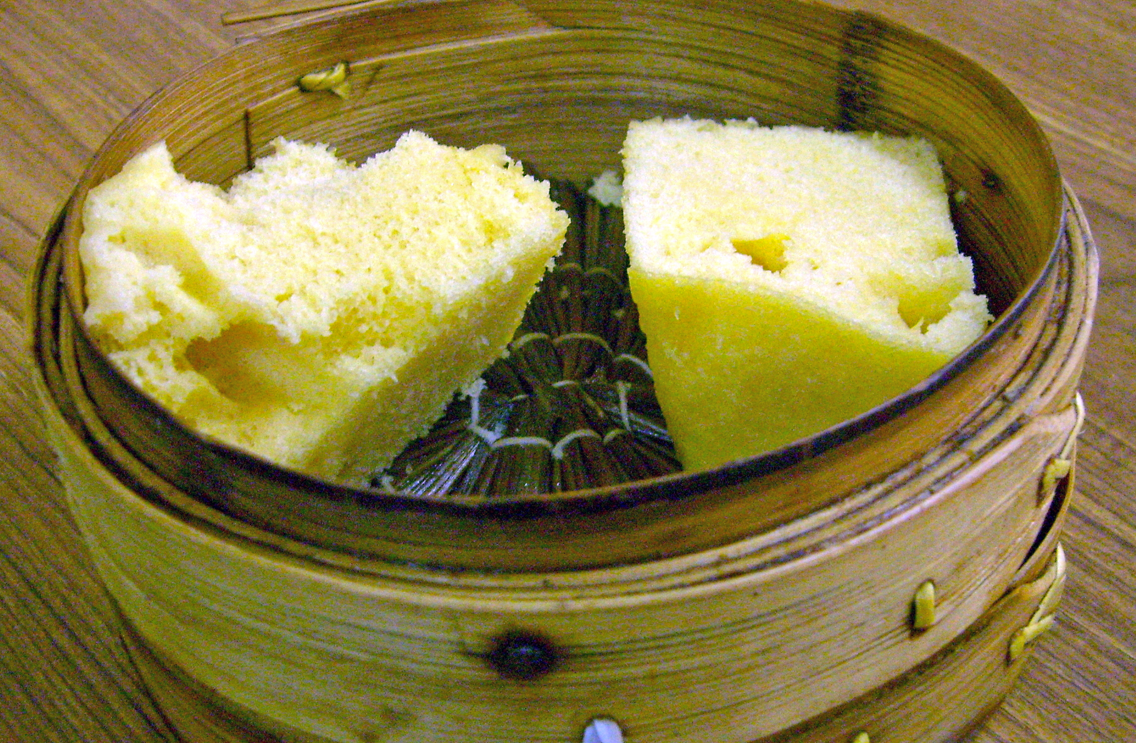 两块马拉糕